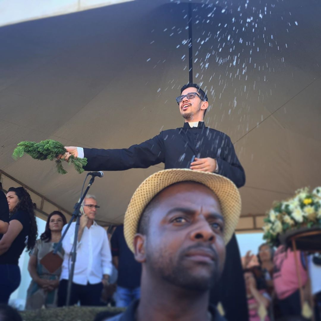 Padre Wellington do distrito de Raposo, cidade de Itaperuna, benze os tradicionais carros de boi, na 57a Festa do Carro do Boi. This photo has been taken in the country: Brazil